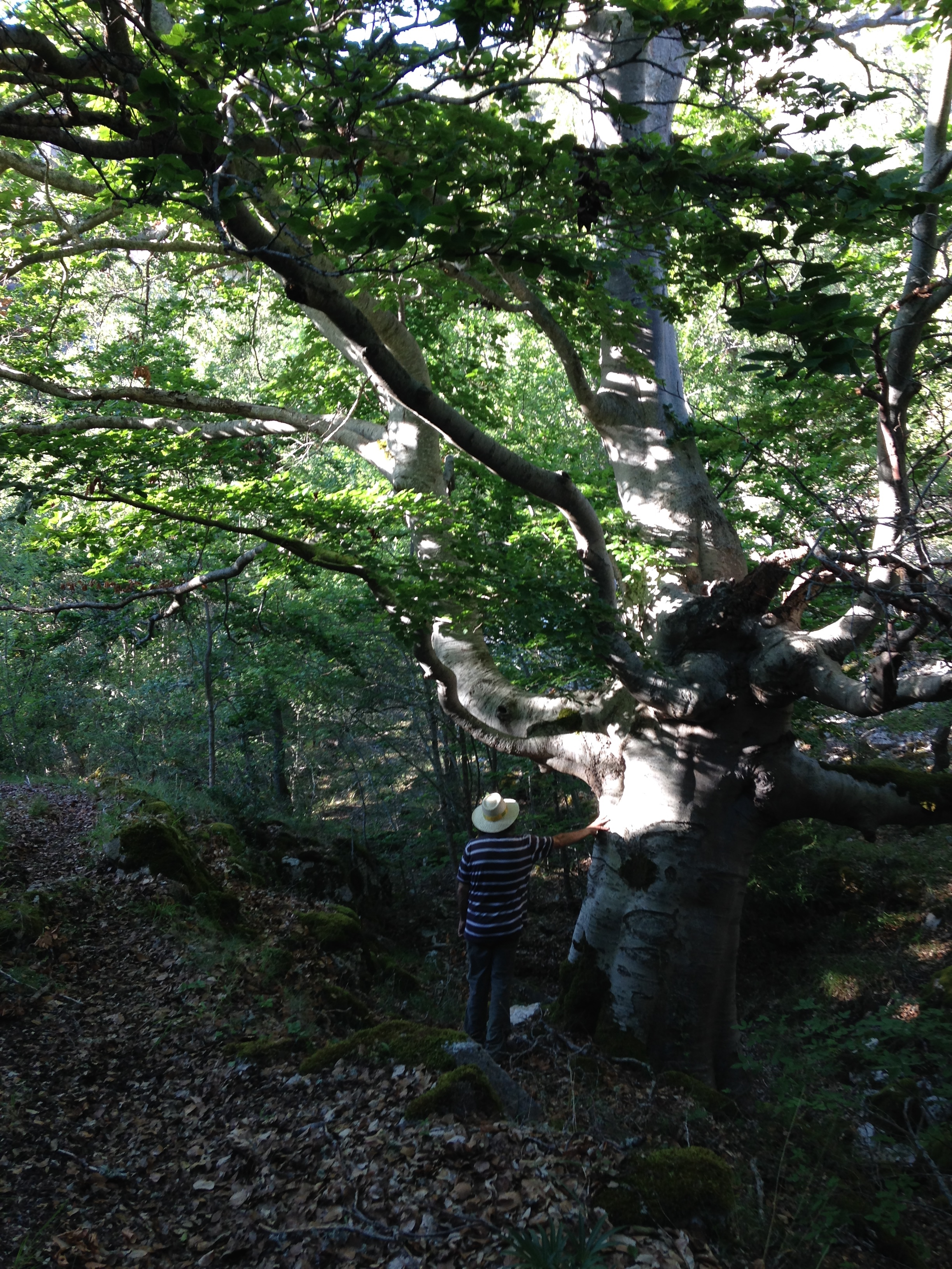 El parque natural de Hoces del Alto Ebro y Rudrón. Una haya centenaria en la Hoya de Huidobro. 2015